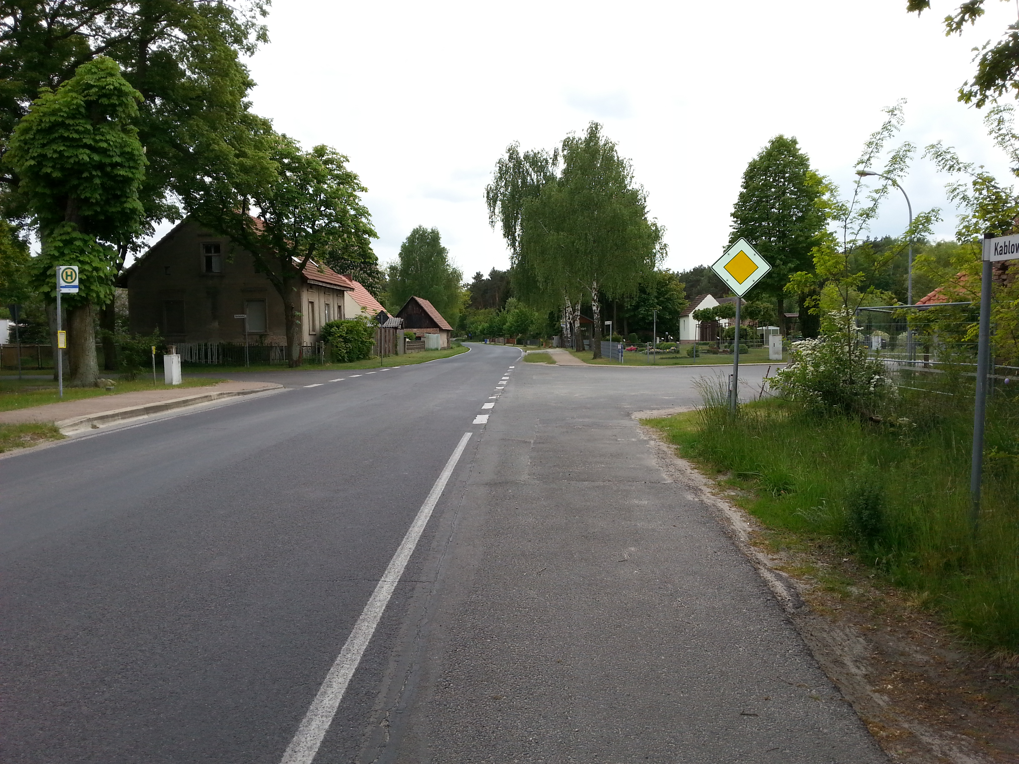 Dannenreich, Dorfkern